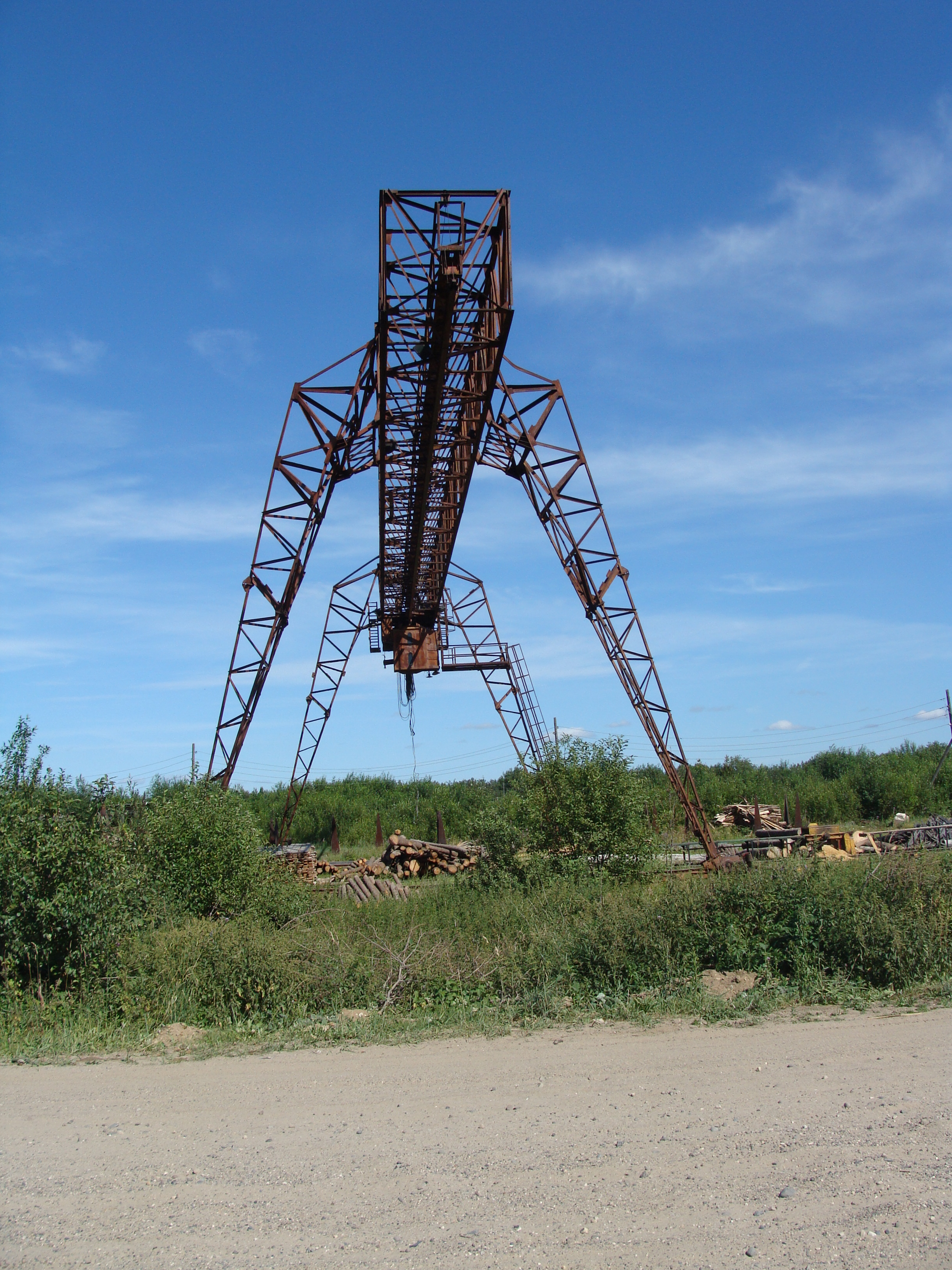 п. Черемушский Котласского района Архангельской области